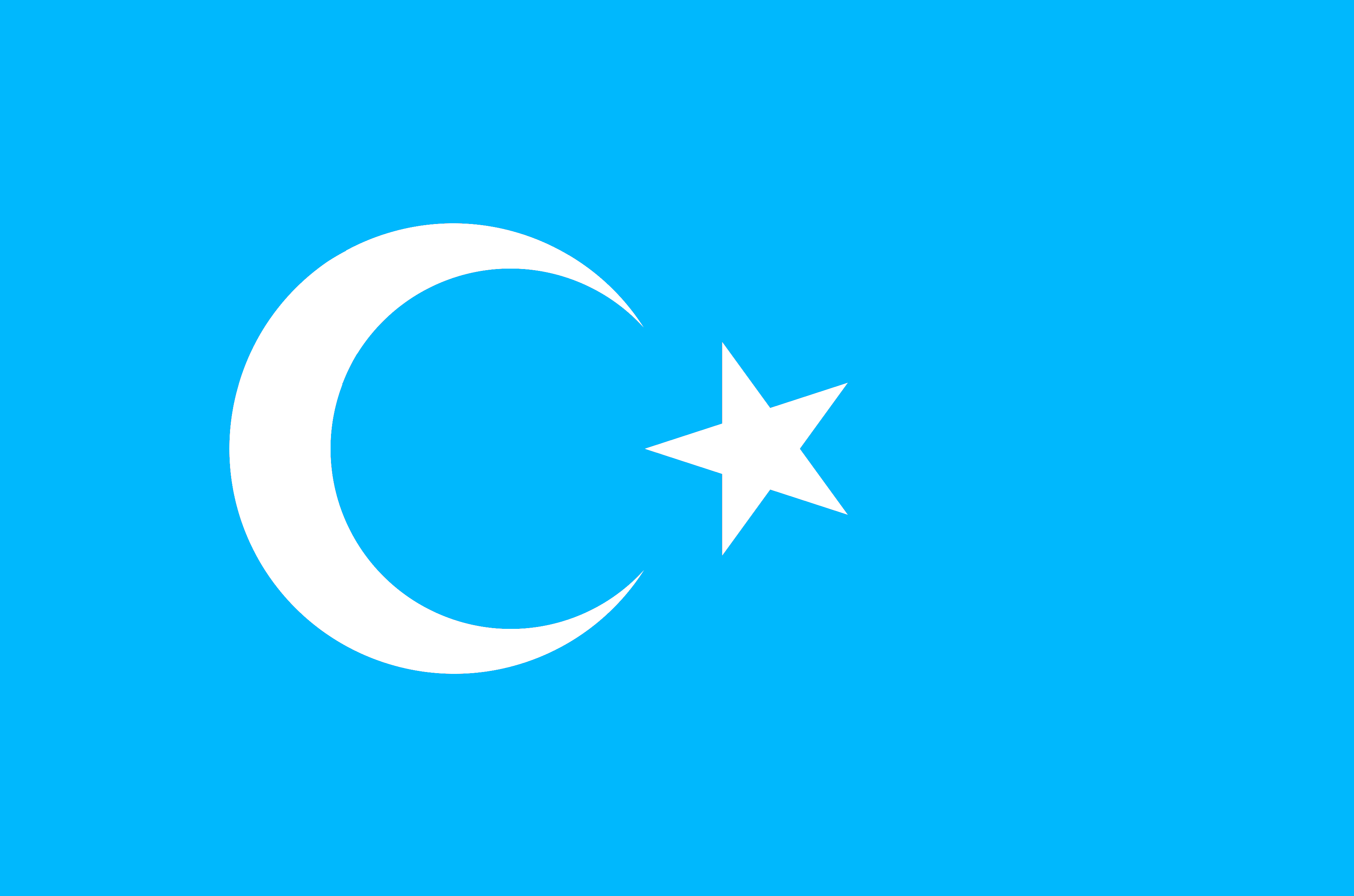 Flag of Xinjiang Uyghur